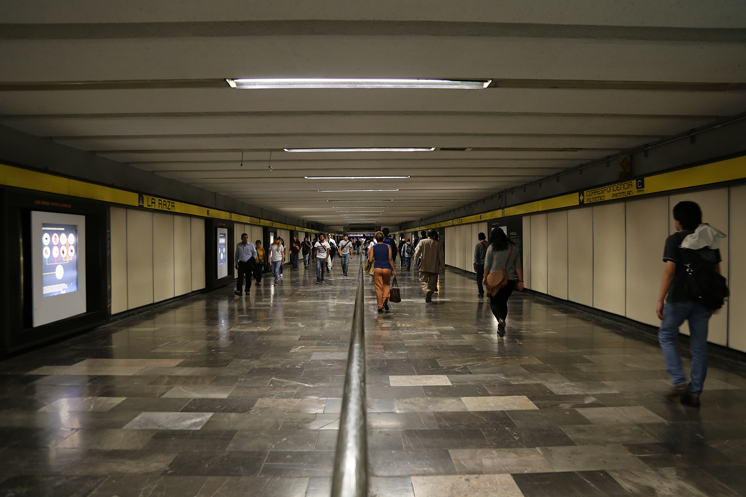 Metro CDMX